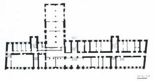 План 1-га паверха будынак Магілёўскага настаўніцкага інстытута (Ленінская, 35)